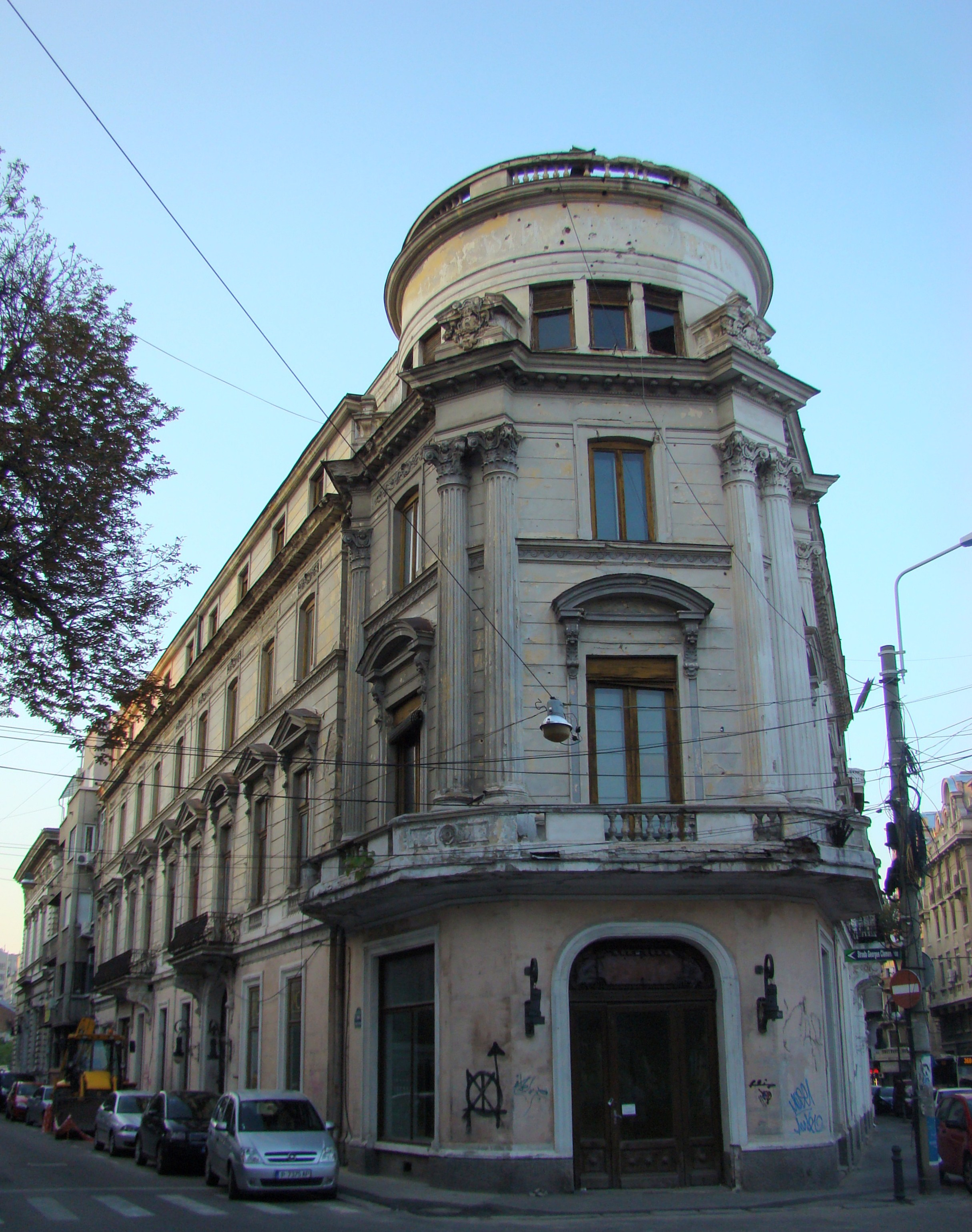 Casă monument istoric, str.Clemenceau, nr.2